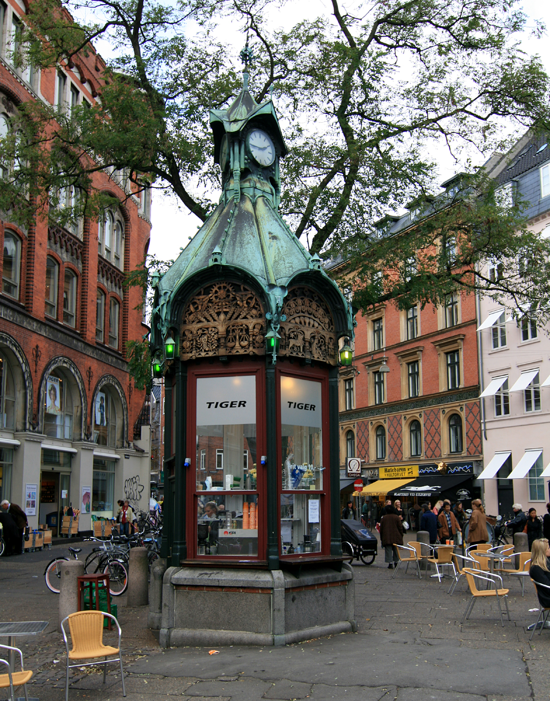 Kiosk på Kultorvet i København.